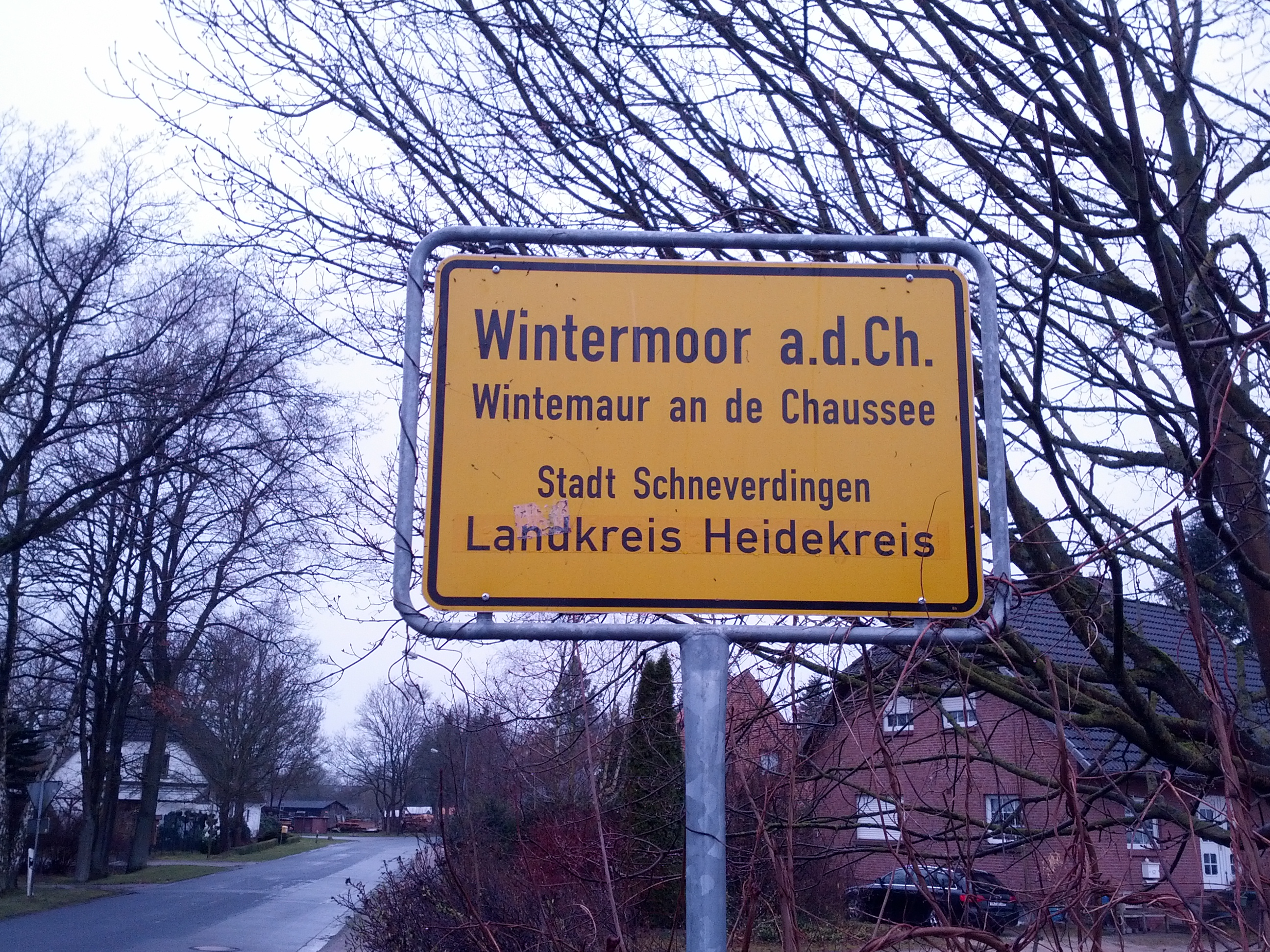 Oortsschild mit den Naam op Hoochdüütsch un op Plattdüütsch